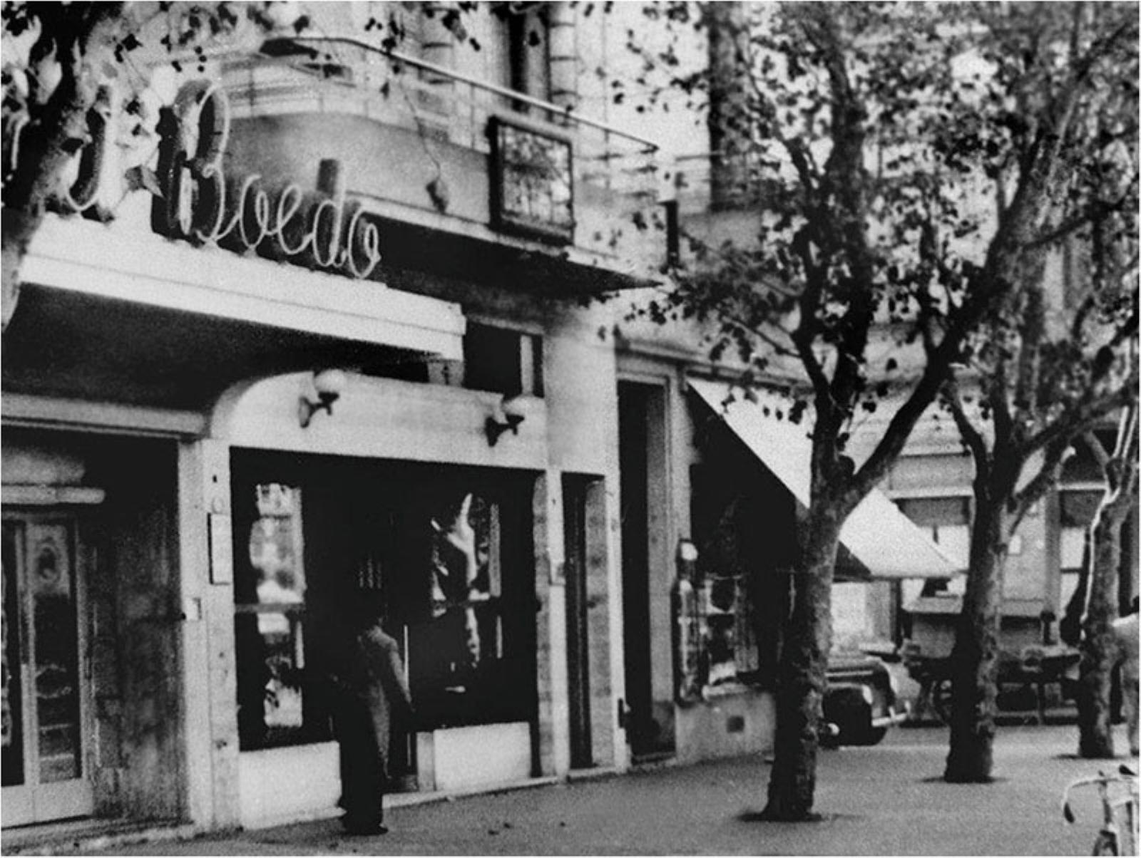 Foto antigua del Café Japonés, en Avenida Boedo 873